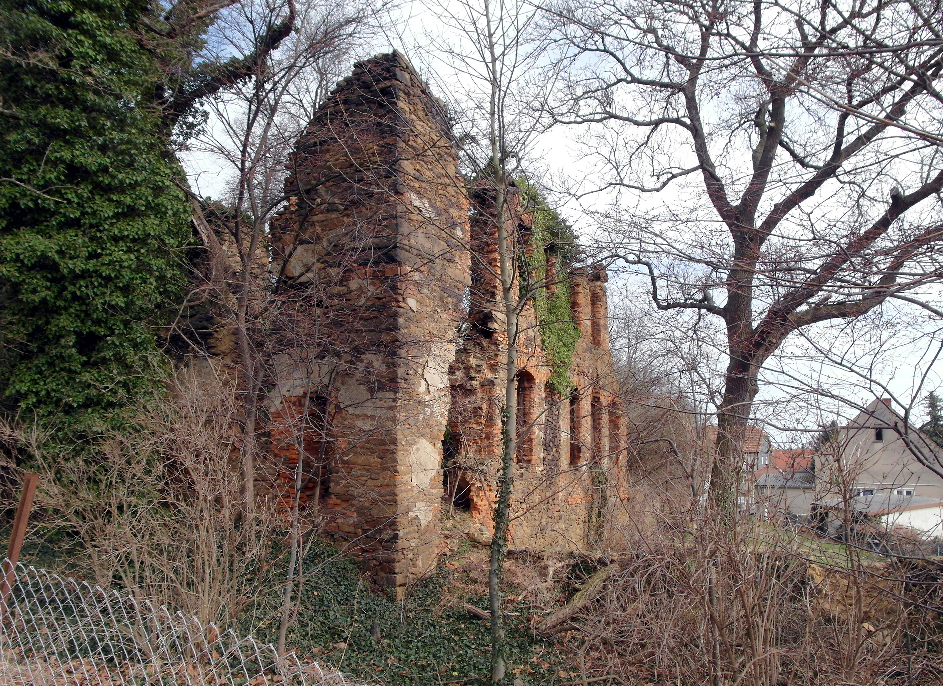 16.03.2017 02627 Nostitz (Weißenberg): Schloßruine. Auf der Grundlage eines mittelalterlichen Herrensitzes erfolgte um 1680 unter Joachim Ernst von Ziegler und Klipphausen der Aus- bau zum Schloß. Im September 1813 wurde es nach Brandschatzung durch französischen Truppen zur Ruine. Am Ortsrand wurde ein neues Herrenhaus errichtet. Sicht von Südwesten. [SAM8425.JPG]20170316160DR.JPG(c)Blobelt